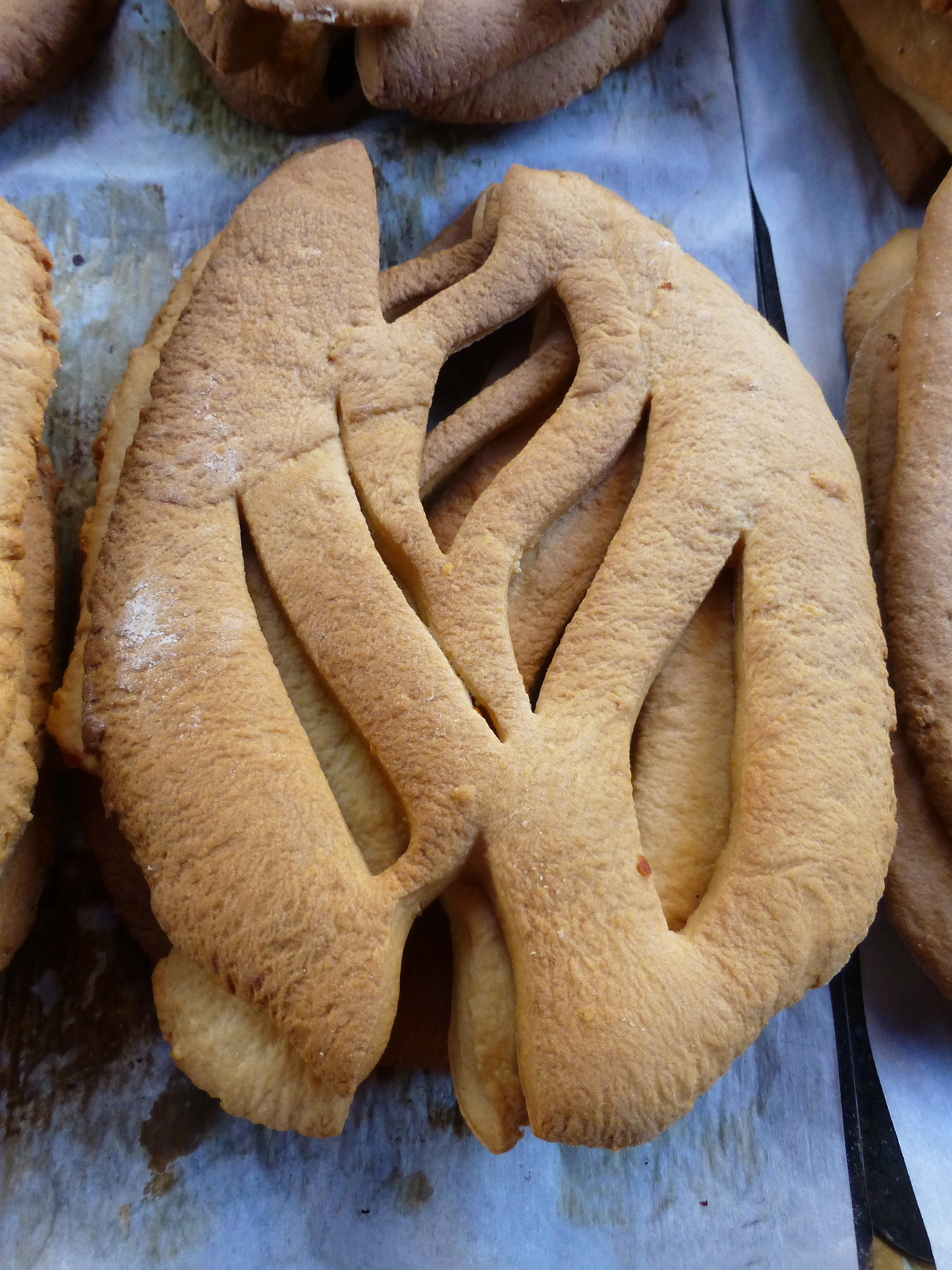 Gibassié de Lourmarin (Vaucluse) : galette provençale à l'huile d'olive